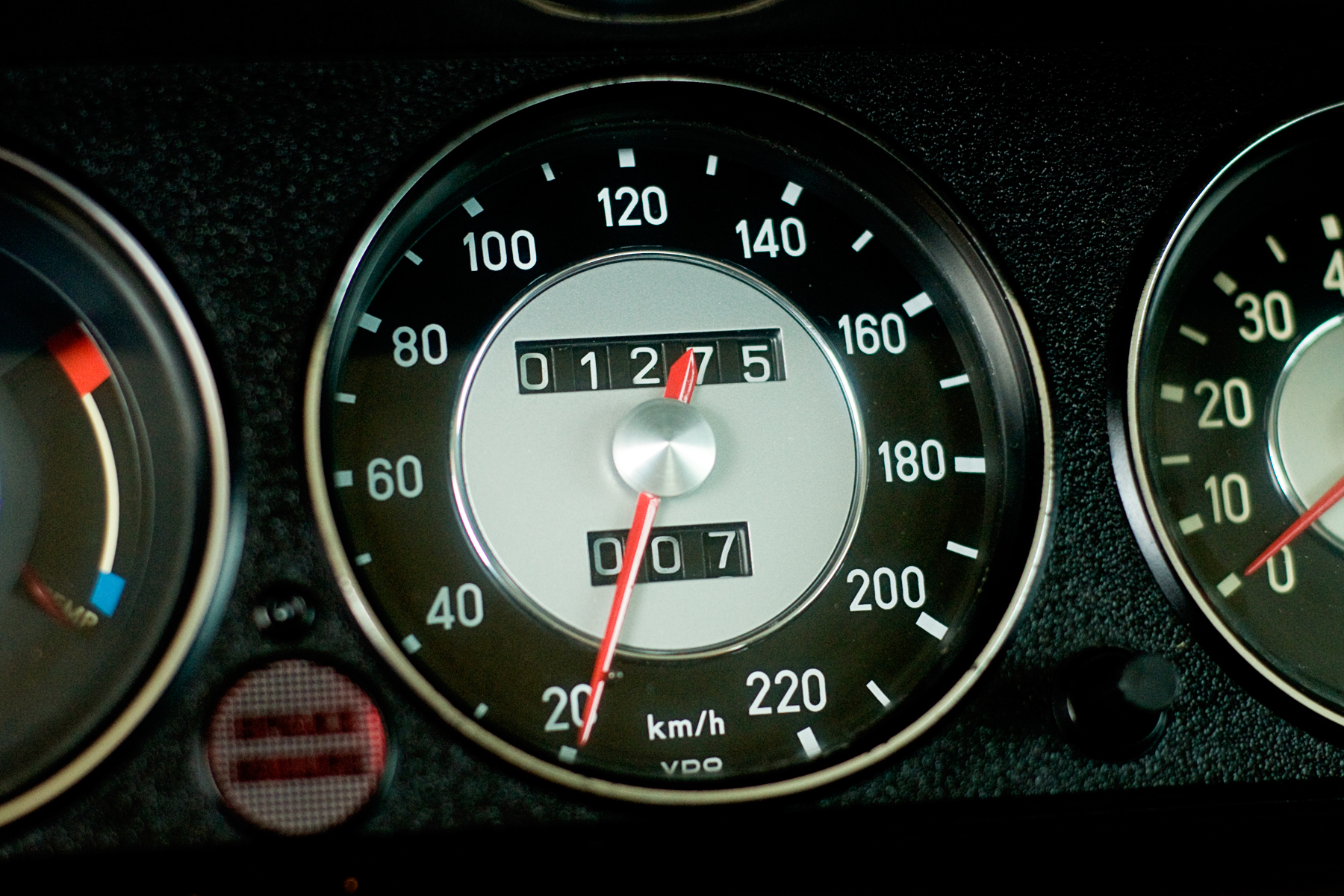 1969 bmw 2002ti (alpina) mileage: 1275